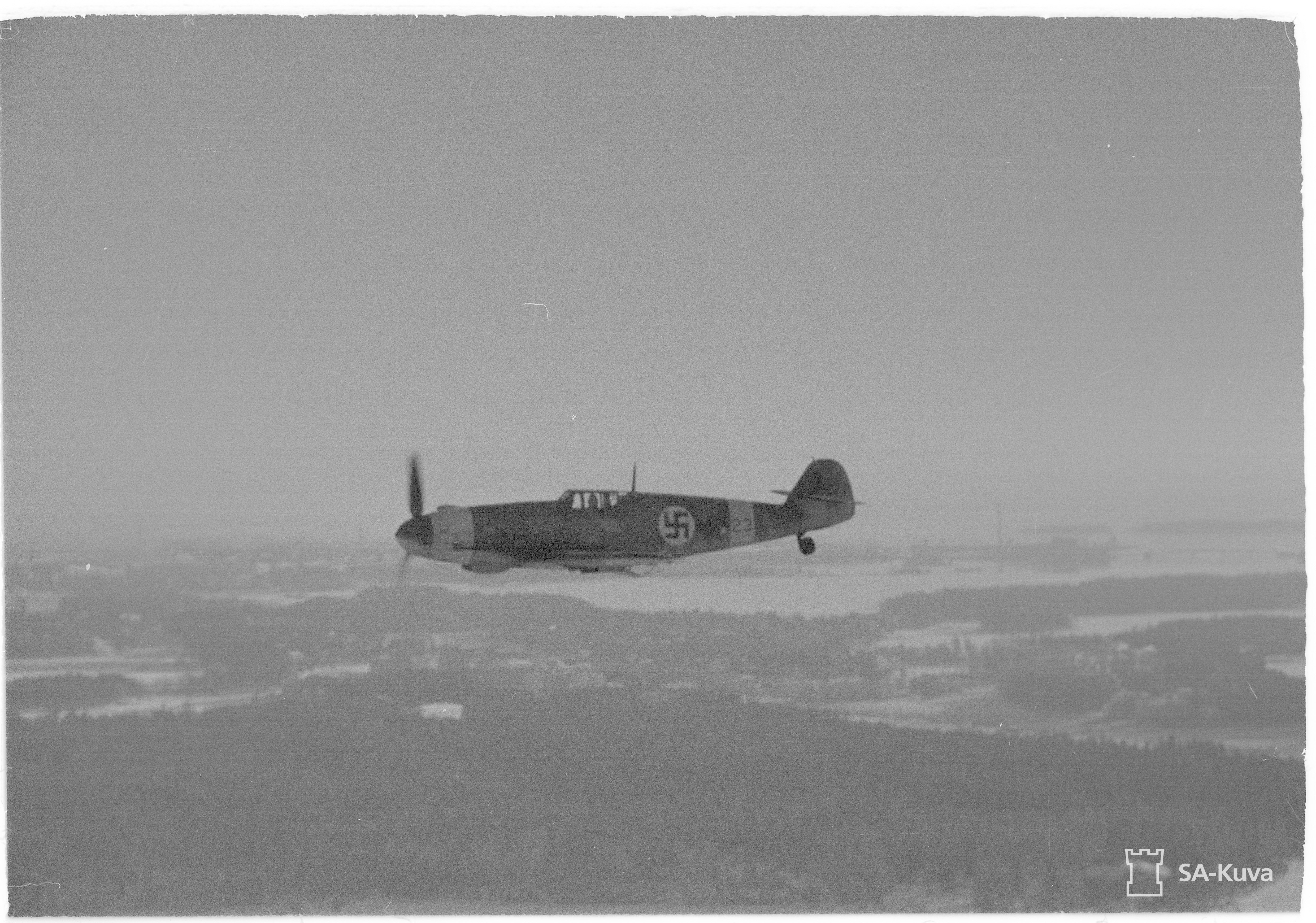 MT-kone ilmassa. (Messerschmidt) (Kuvassa on Messerschmitt Bf 109 G-2). Kuvauspaikka: Malmin lentokenttä.